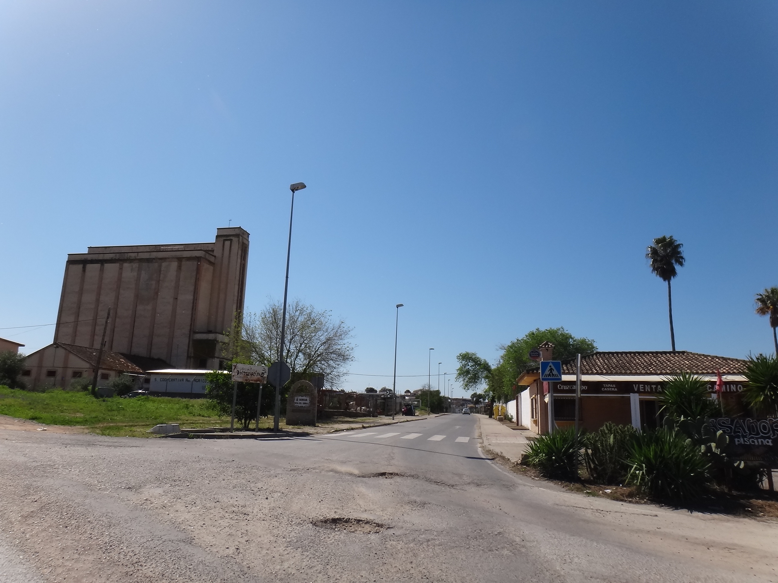 Mesas del Corral (La Barca - Jerez). Andalucía, España